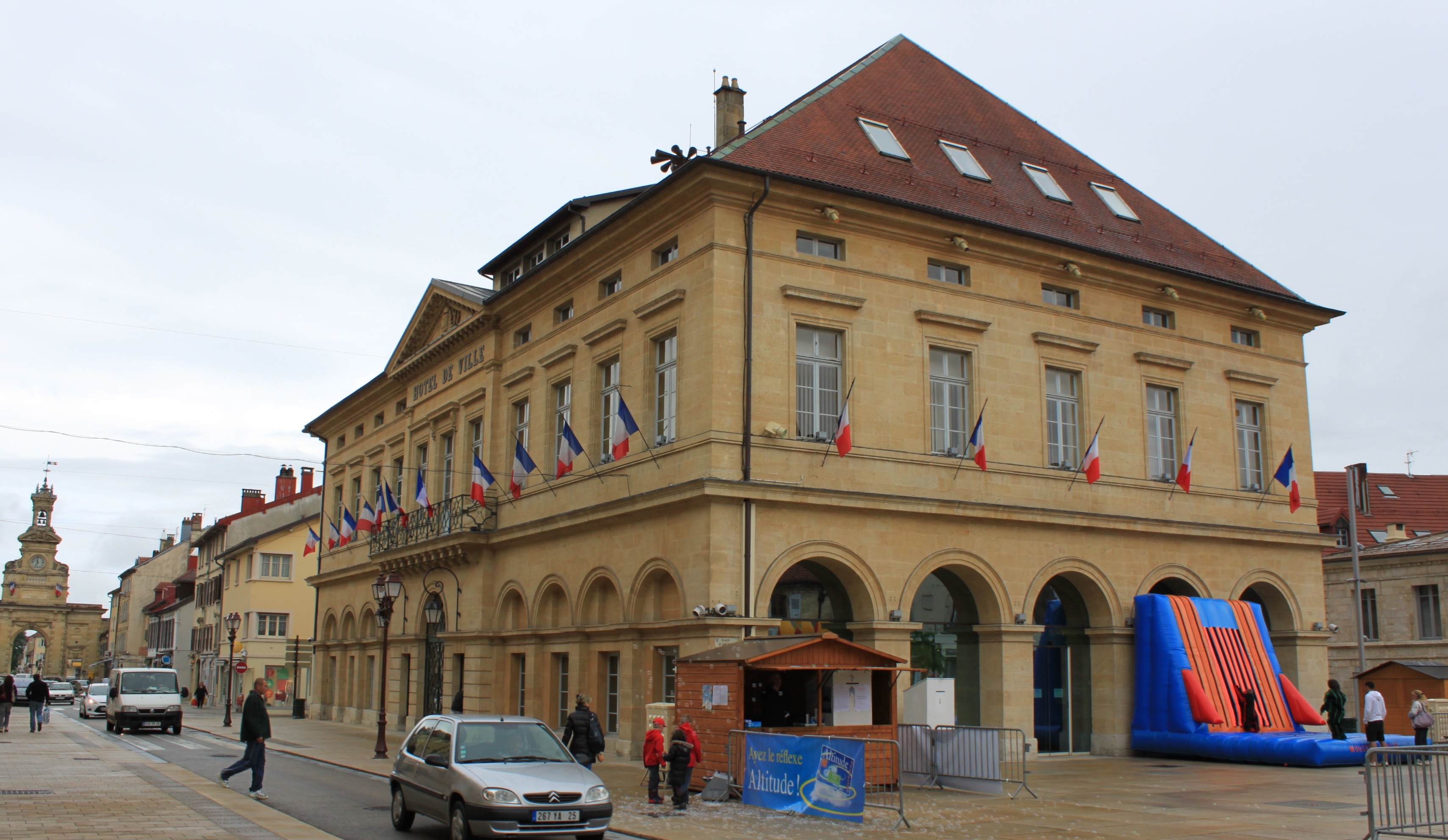 Hôtel de ville, Pontarlier, Doubs, Franche-Comté, France